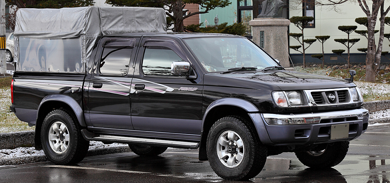 Nissan Datsun Truck 4WD Double Cab 3.2 Turbo Diesel AX (D22)